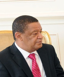 Həbəşistanın Azərbaycanda yeni təyin olunmuş səfiri Mulatu Teshome